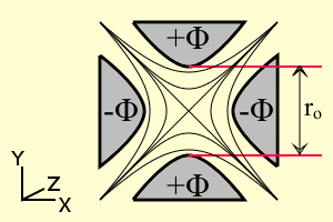 coupe d'un analyseur quadripolaire en spectrométrie de masse